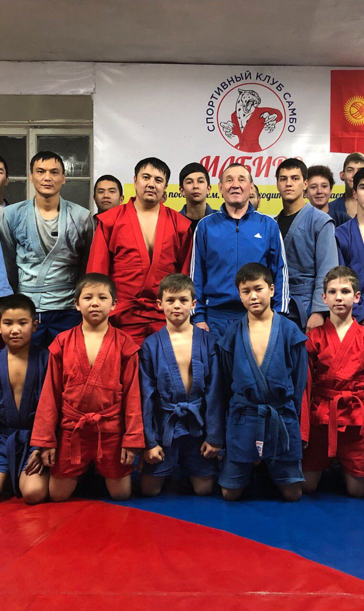 Кружок по самбо Марлена Маматалиева